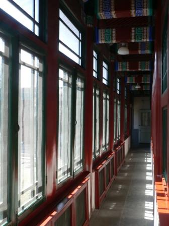 暖廊内部 拍摄